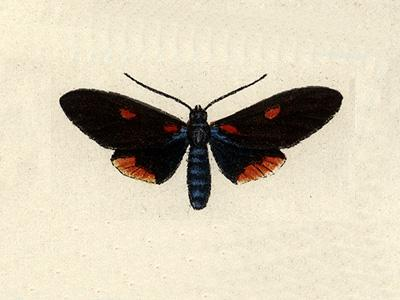 Cyanopepla fastuosa